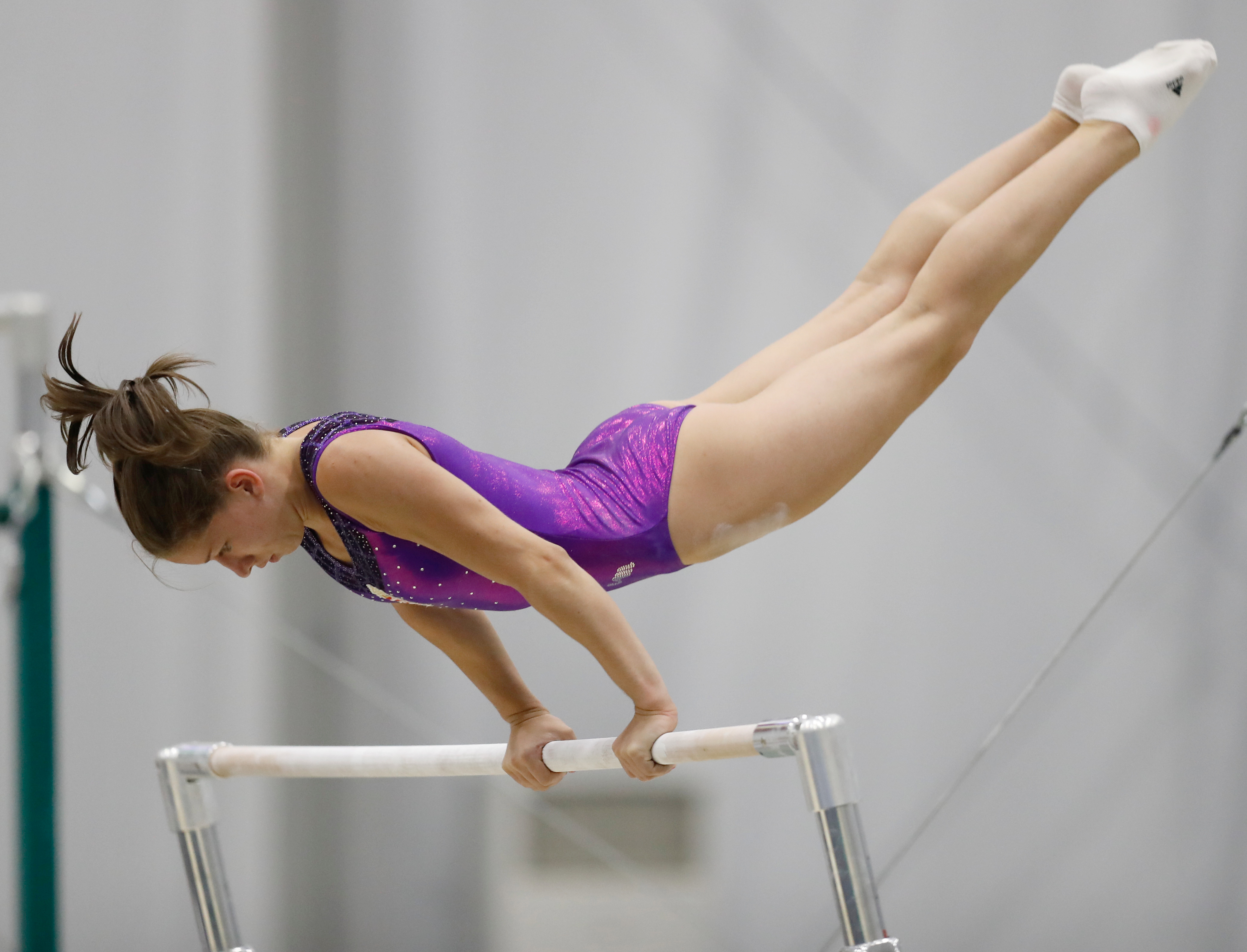 Rio de Janeiro - Atleta da ginástica artística da Hungria treina no Parque dos Atletas para os Jogos Olímpicos Rio 2016. (Fernando Frazão/Agência Brasil)